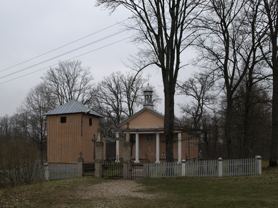 Stakių šv. Antano Paduviečio bažnyčia, Jurbarko rajonas